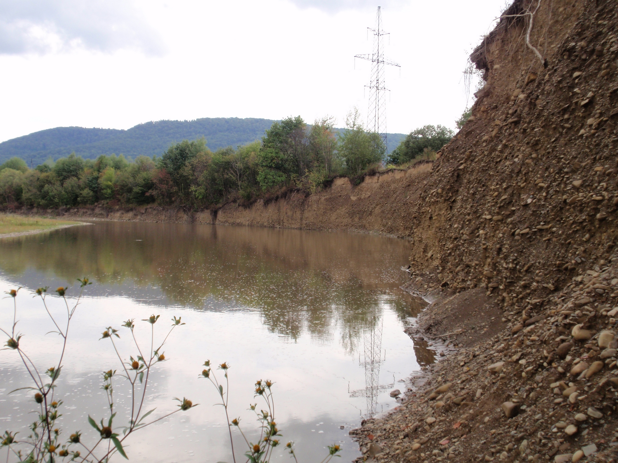 Річковий алювій першої надзаплавної тераси р. Опір смт. Верхнє Синьовидне